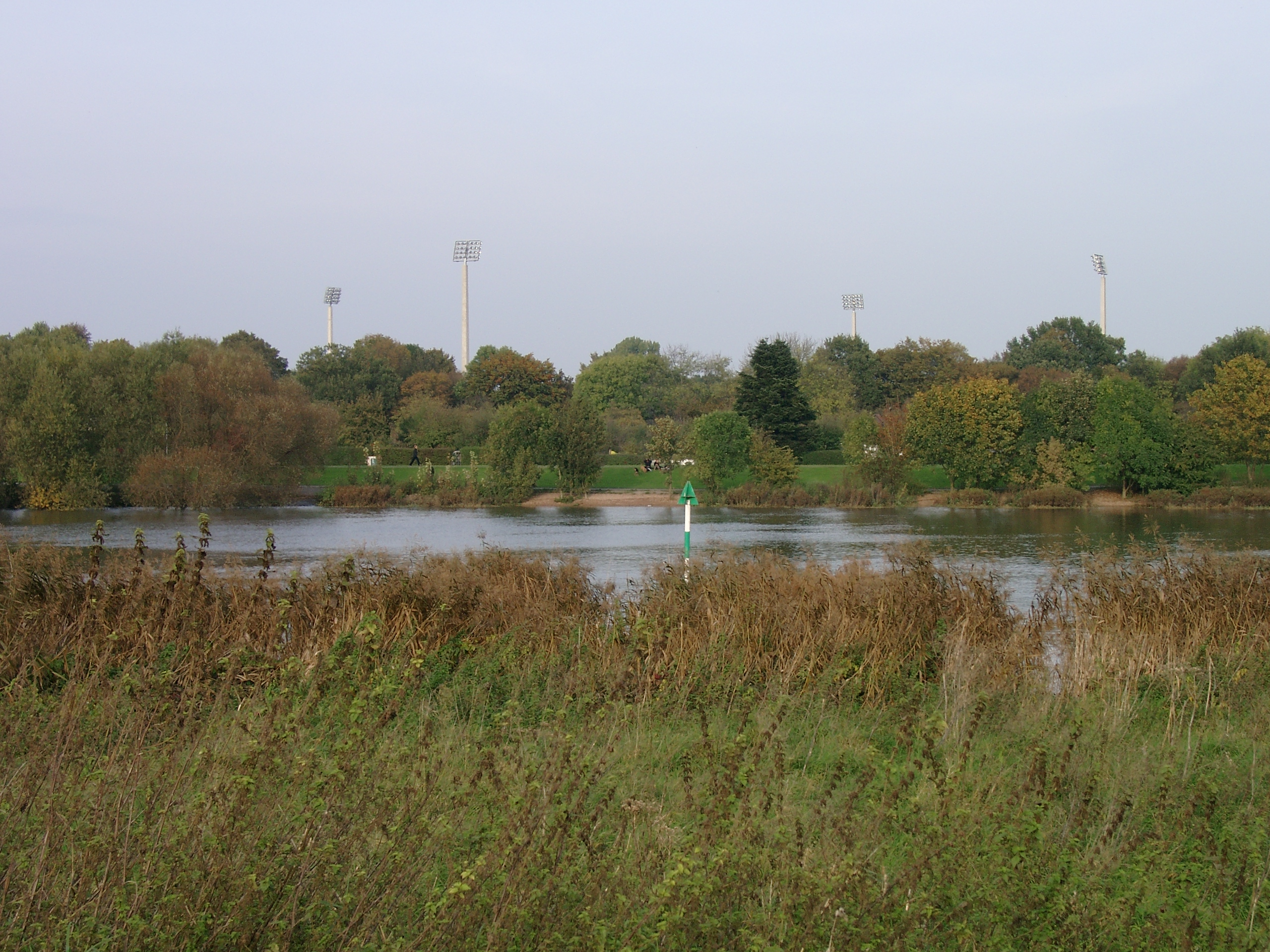 Die Flutlichtmasten des Platzes 11 des SV Werder Bremen in Bremen, Spielstätte der Regionalligamannschaft des SV Werder Bremen, wurden im Sommer 2007 installiert. Durch die Masten ist Platz 11 jetzt auch von weitem (hier: von der anderen Weserseite, von Südwest, her) gut auszumachen.